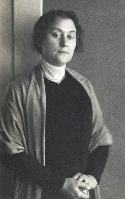 Porträt von Gertrud Simmel, Ehefrau von Georg Simmel.